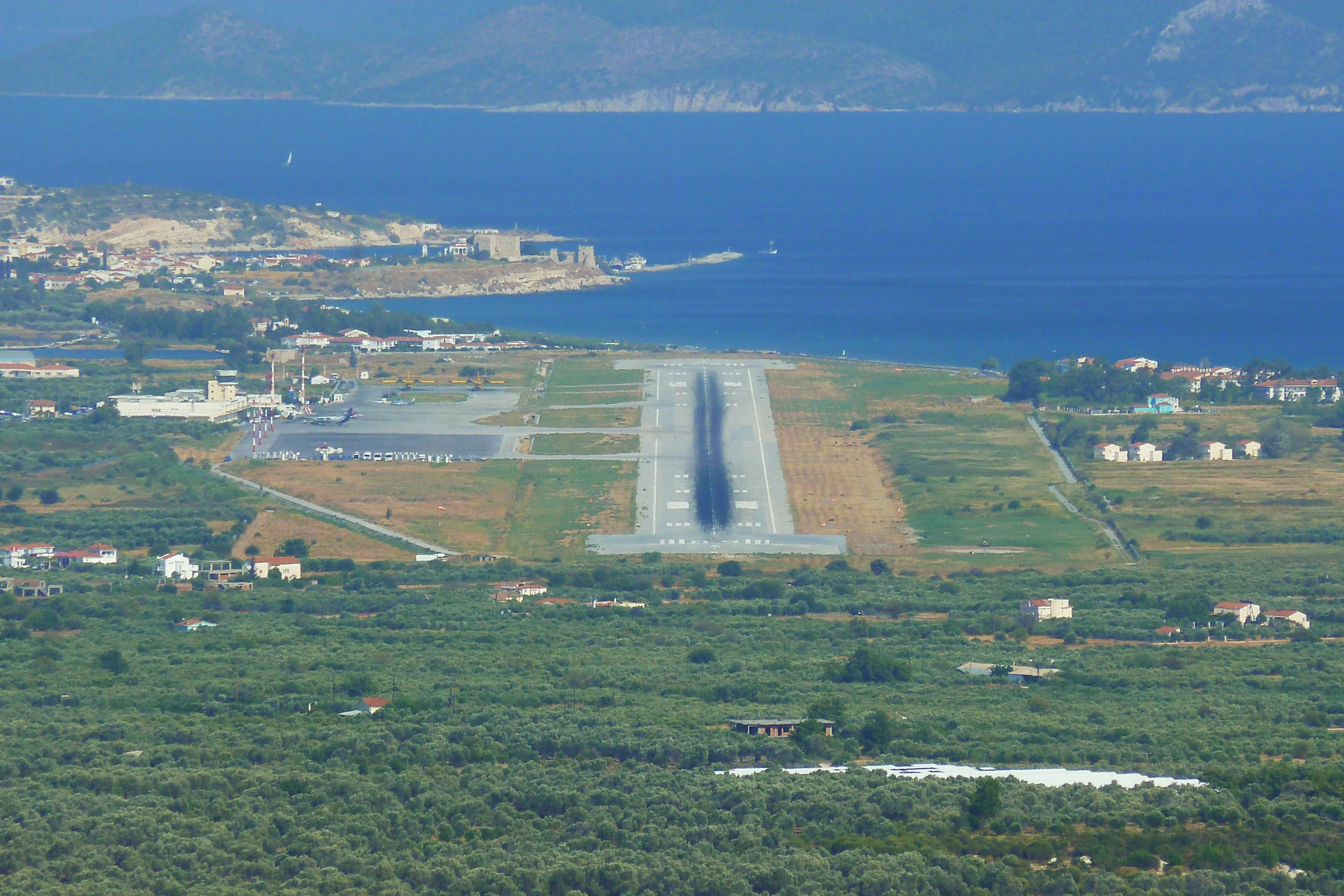 Blick auf den Flughafen von Samos, Griechenland, im Hintergrund die Stadt Pythagorio.